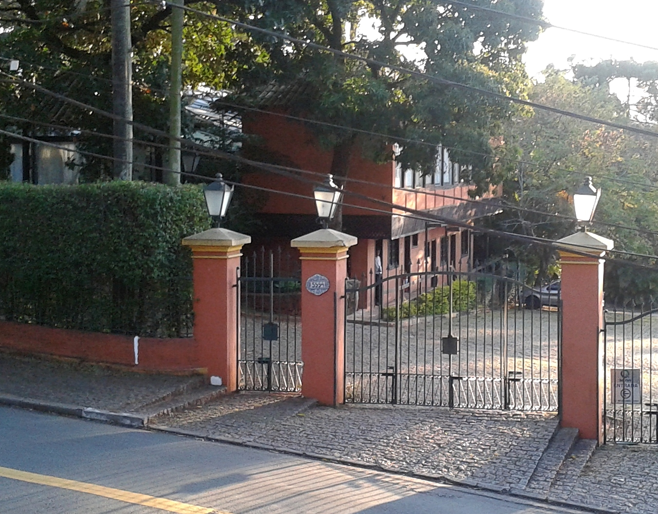 Casa da Fazenda do Morumbi, no bairro do Morumbi, em São Paulo.